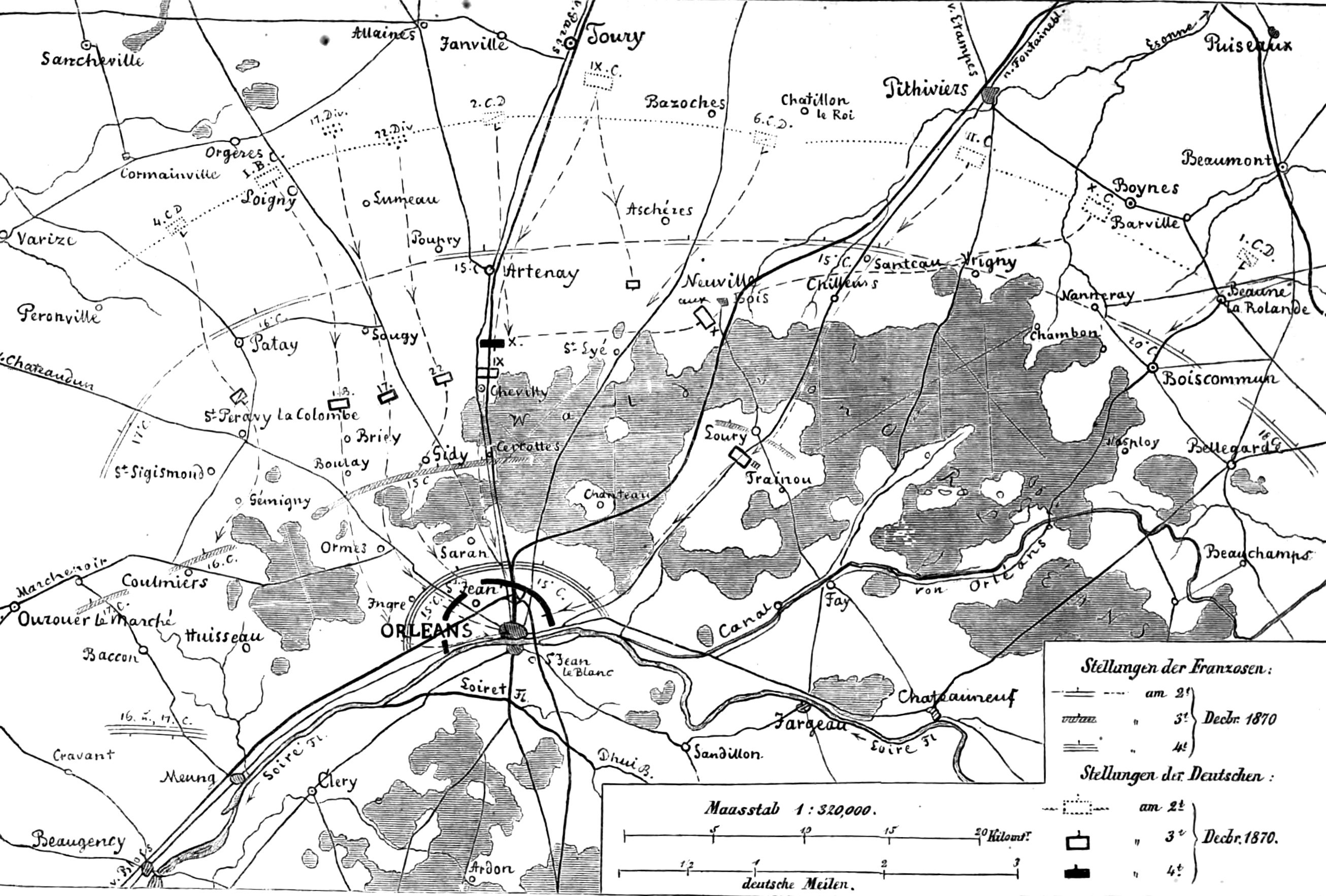 Karte der Schlacht von Orleans 1870